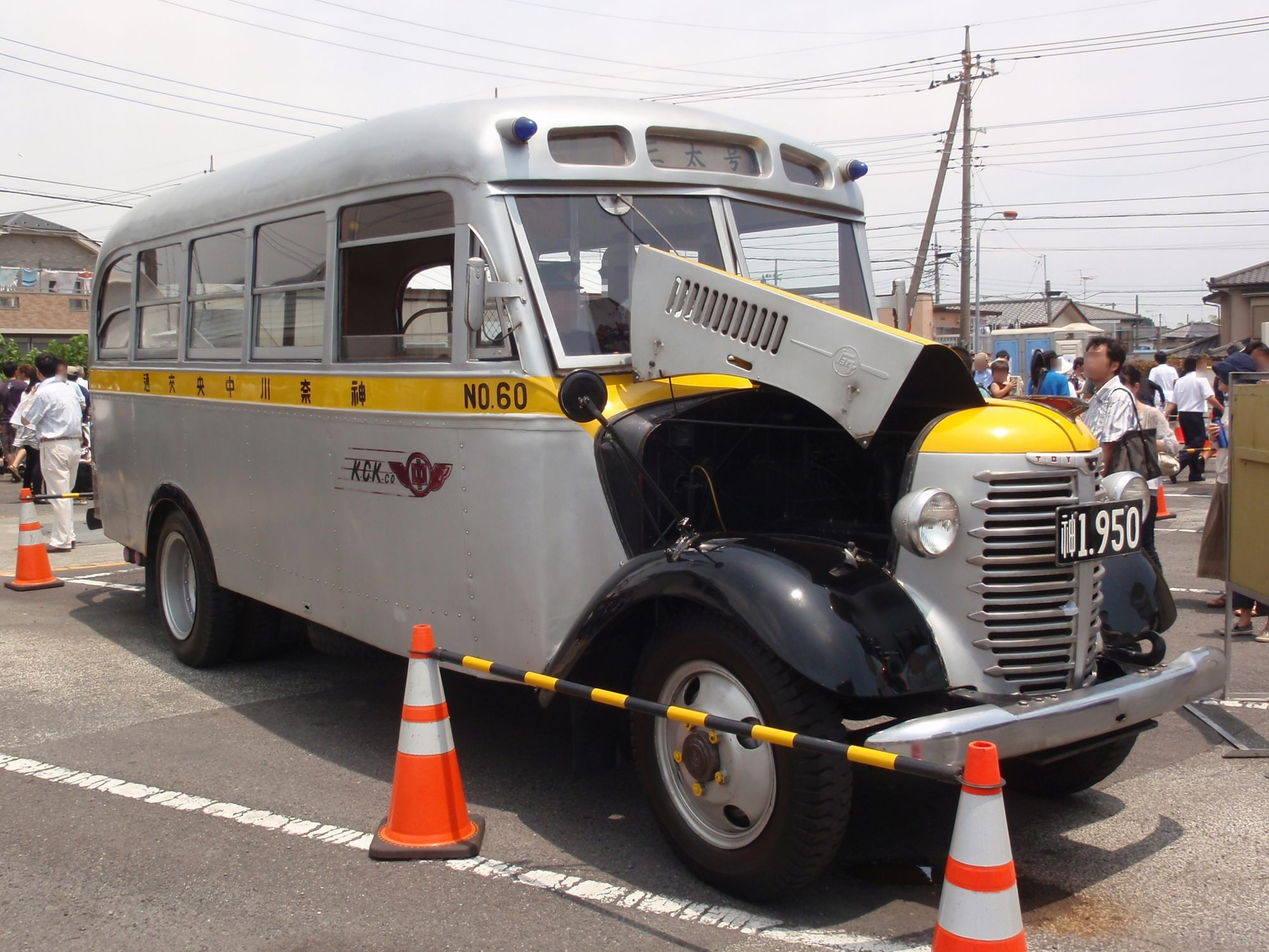 Kanachu "Santa Go" at Atsugi branch